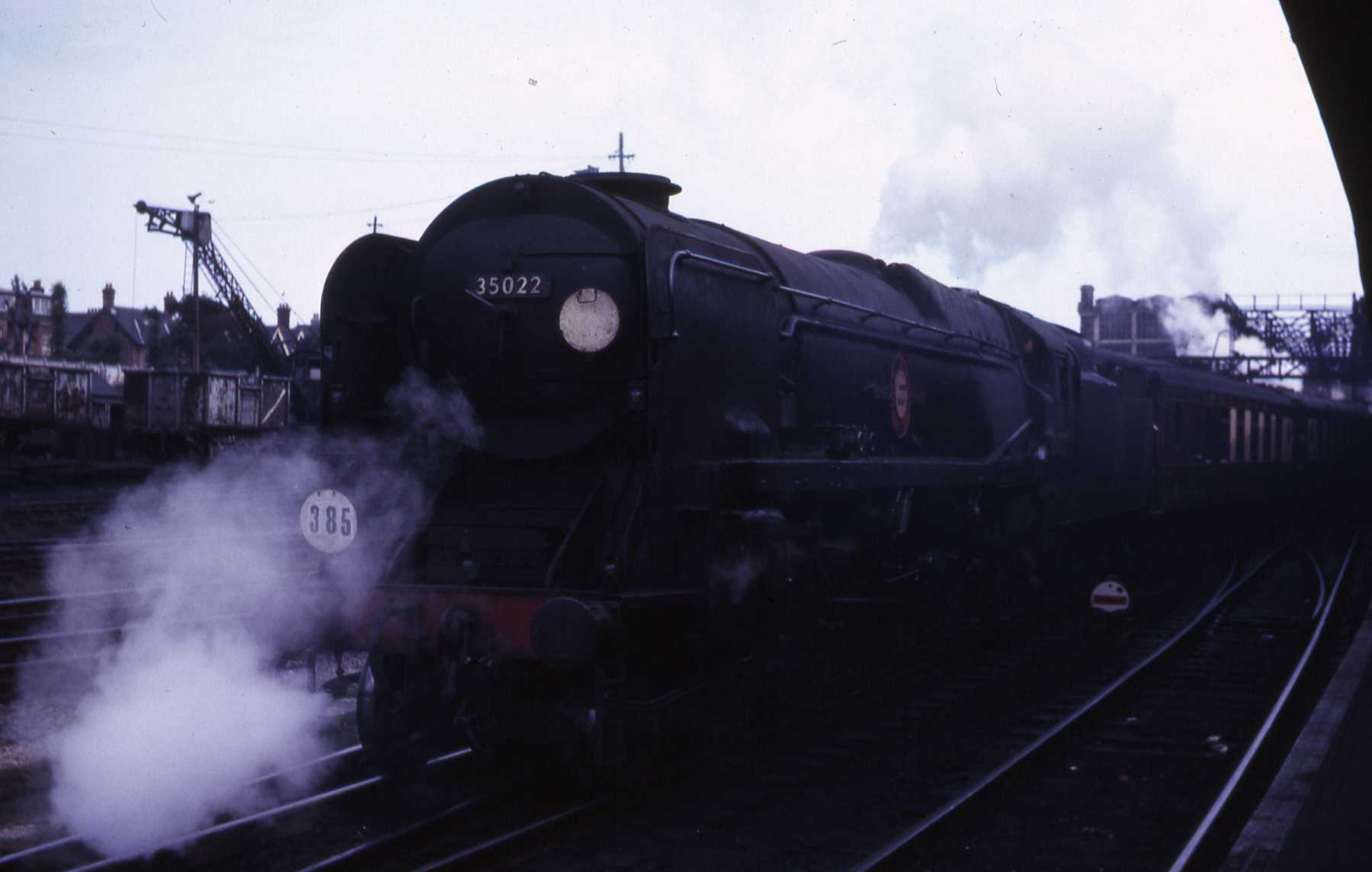 Agfa Silette; scanned from 35mm slide.